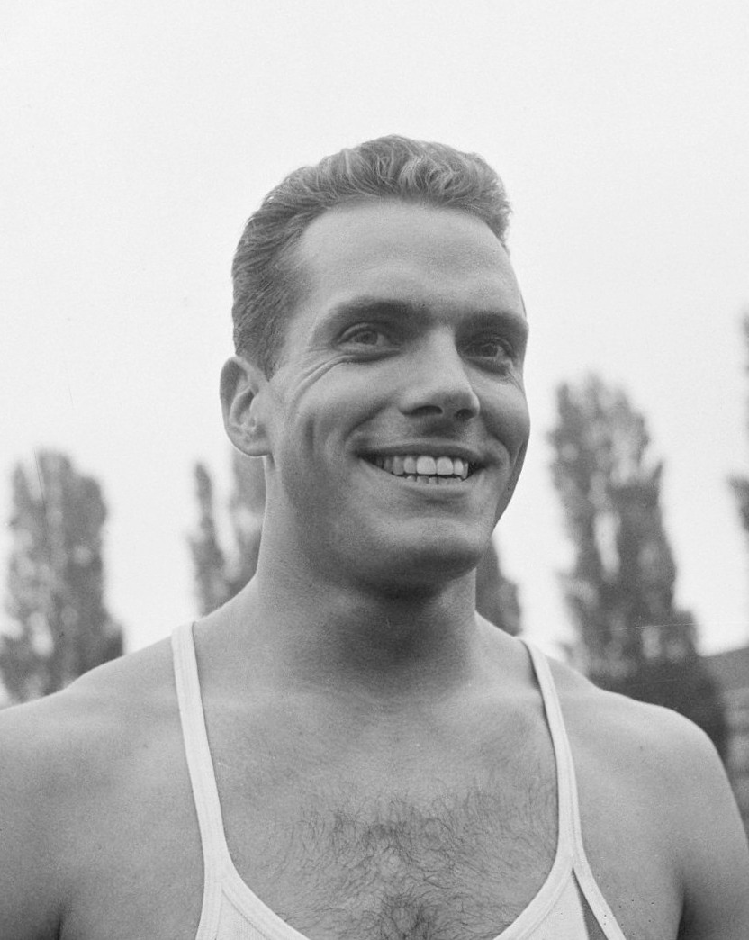 3000m Steeple Chase heren. Eef Kamerbeek